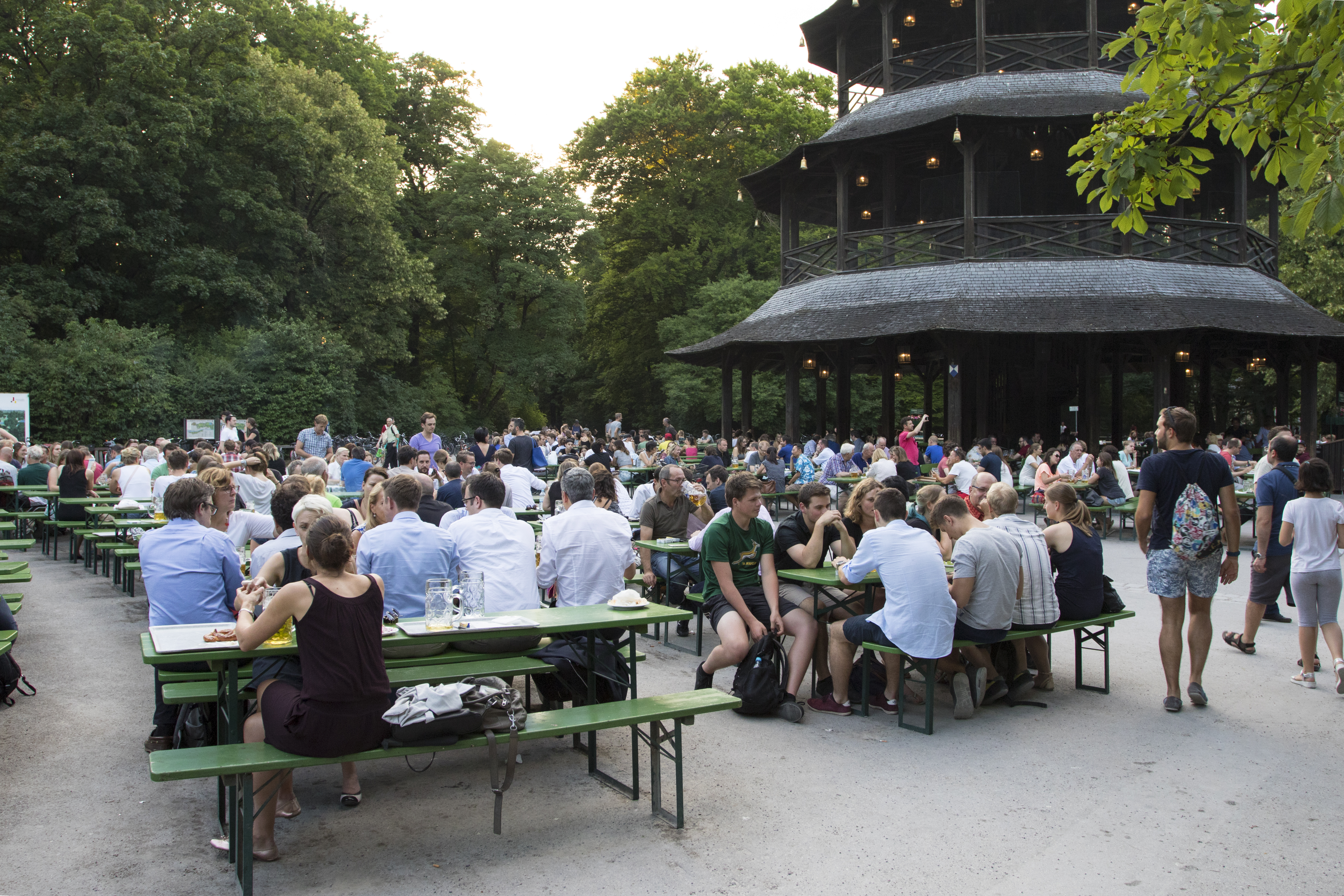 Biergarten alla Torre Cinese di Monaco